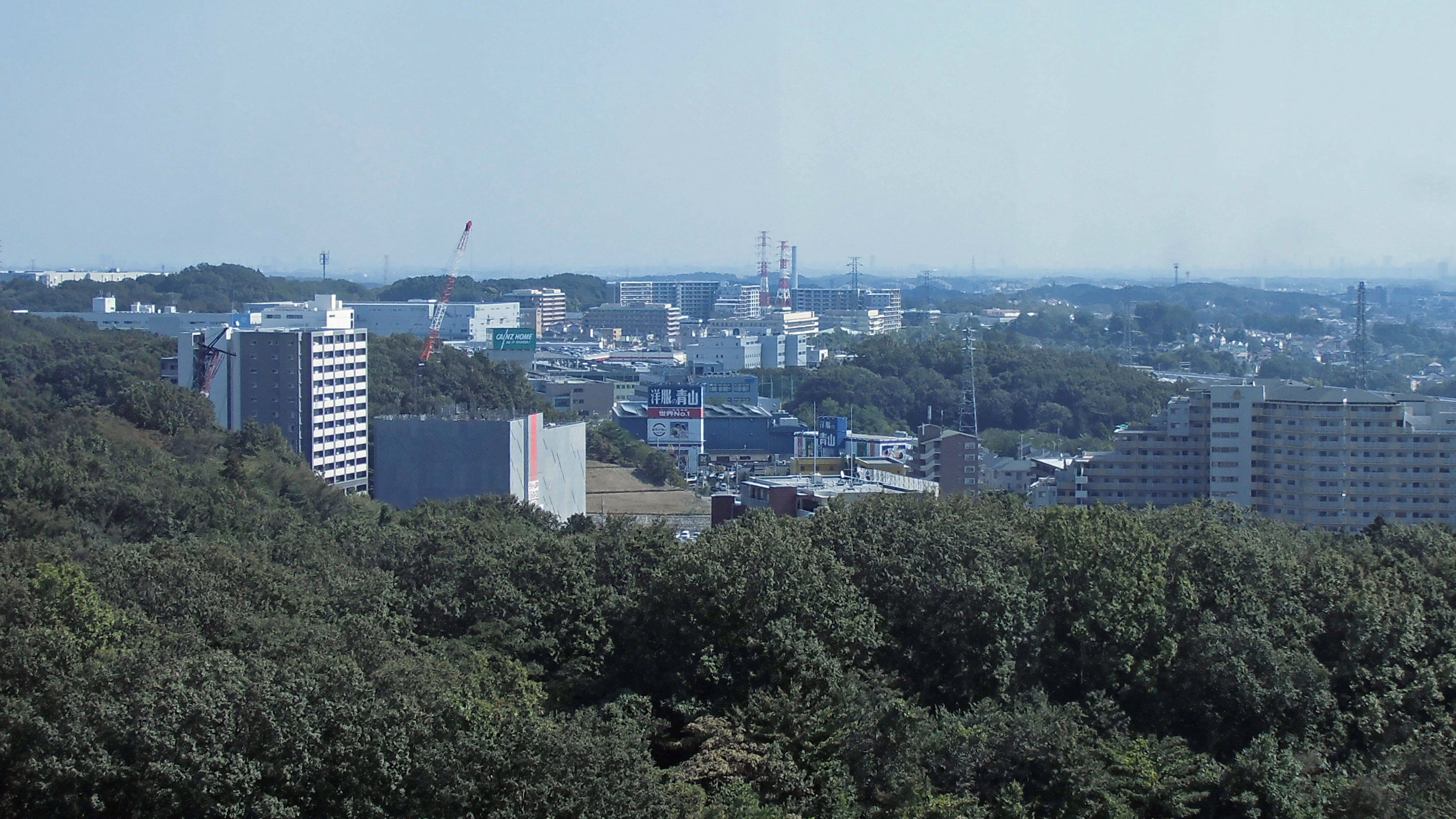 多摩ニュータウン多摩境地区の街並み（2013年10月12日撮影）